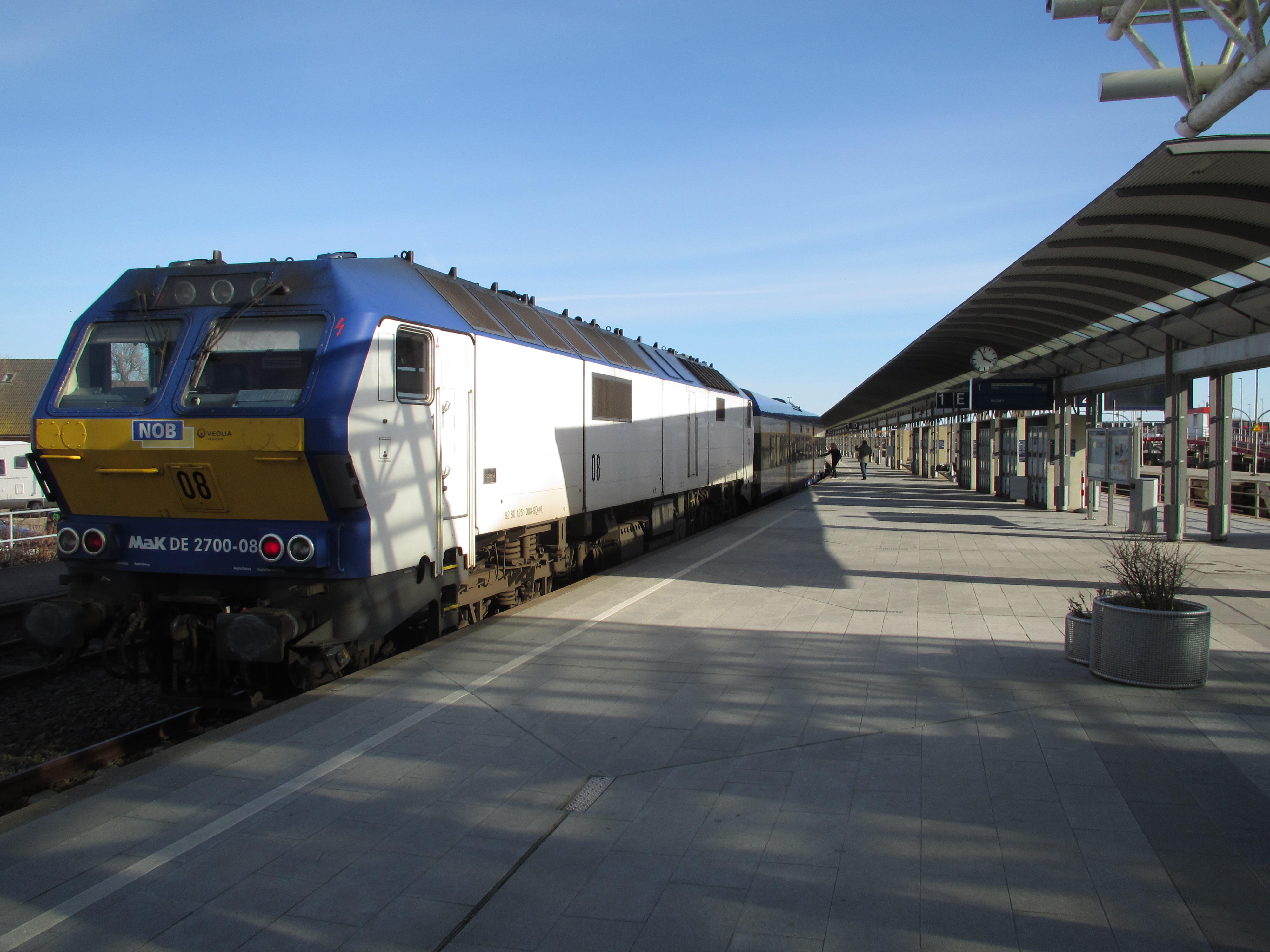 Sylt-Westerland-Bahnhof-Zug der Nord-Ostsee-Bahn GmbH (NOB)